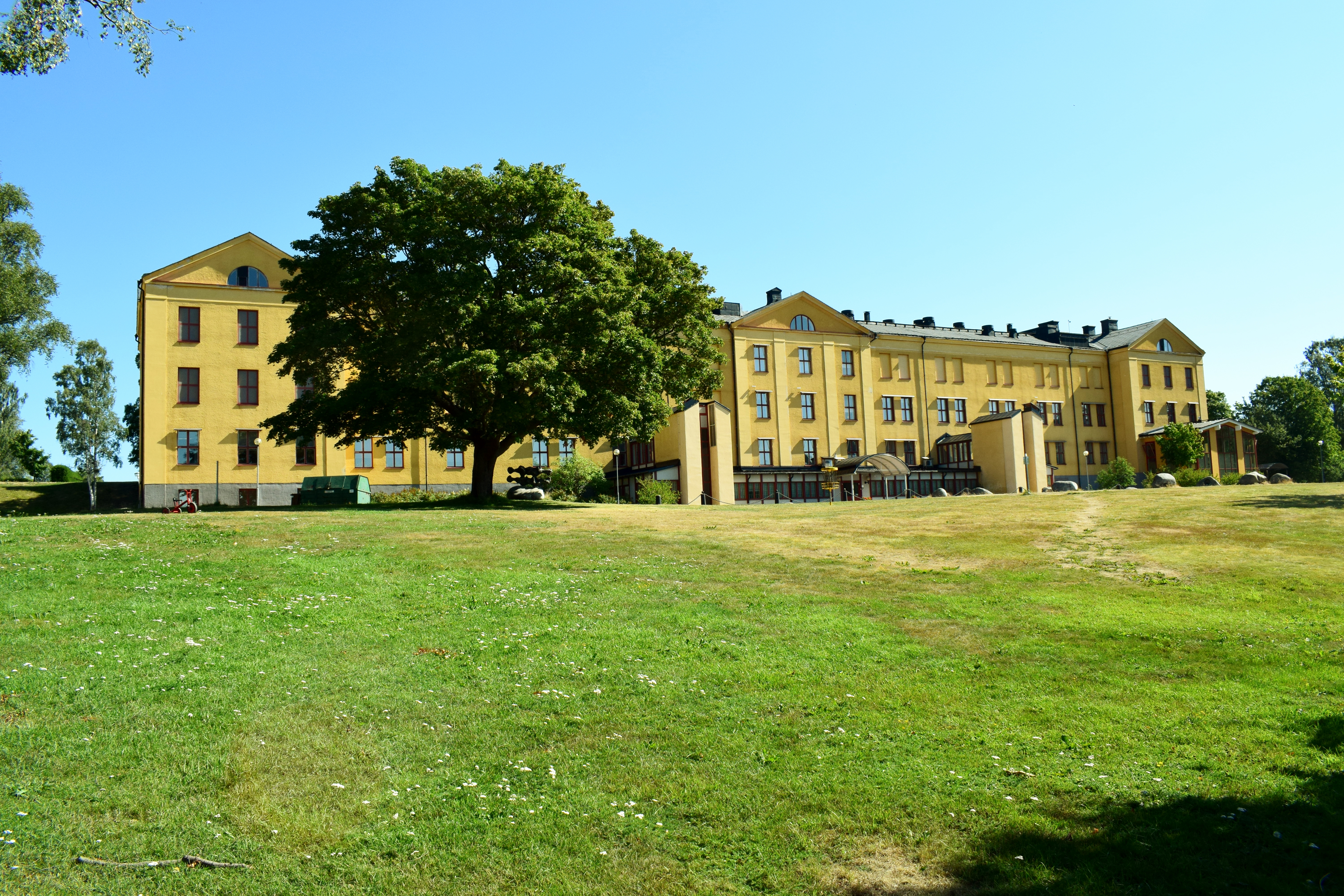 Landsakrivet i Härnösand. Byggnaden uppfördes 1919 till Hemsö kustartilleri. Åren 1931-1975 huserade Vanföreanstaltens i Härnösand i byggnaden, och från 1983 Landsarkivet. Byggnaden ritades av Erik Josephson.